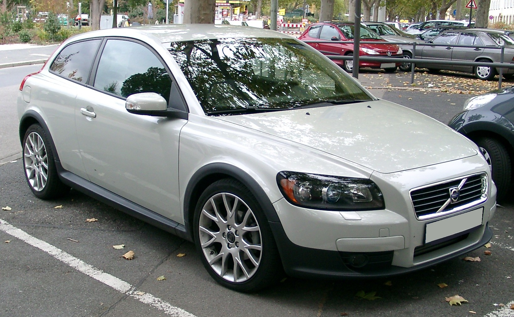 Volvo C30